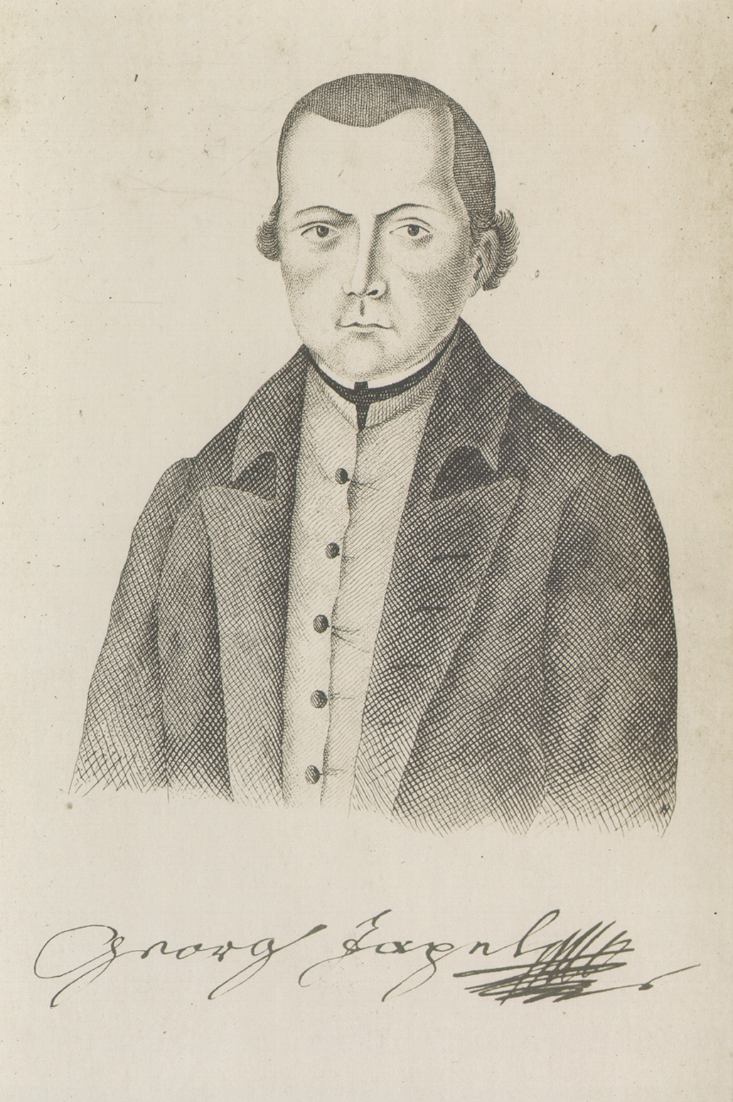 Jurij Japelj (1744 - 1807), Slovene poet, linguist, translator and priest.